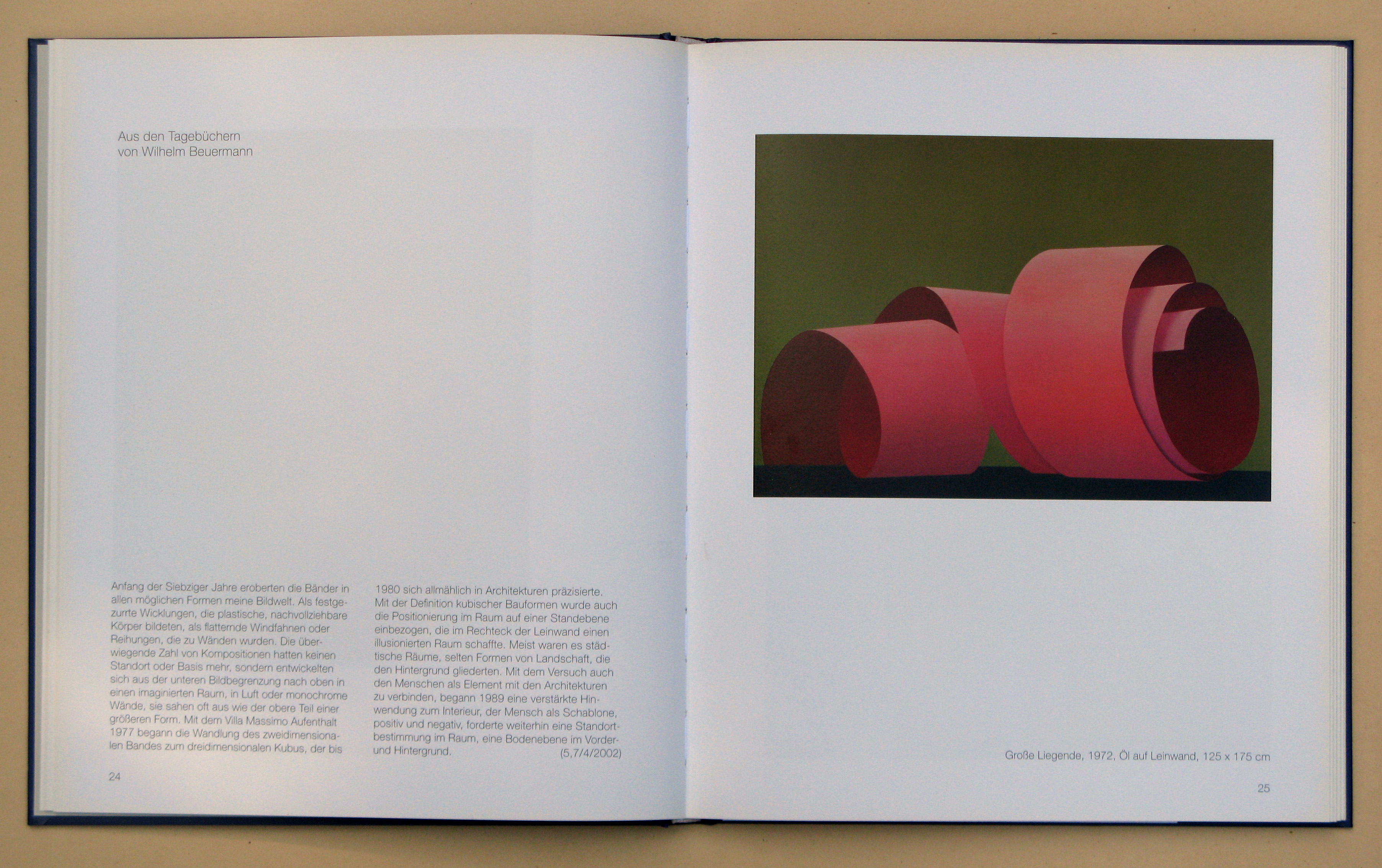 Text aus den Tagebüchern des Malers Wilhelm Beuermann mit dem Abdruck eines Ölgemälde des Künstlers